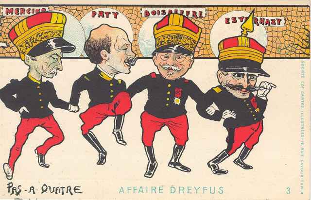 Carte postale, c. 1898. Sous le titre "Pas à quatre", le général Auguste Mercier, ministre de la guerre en 1894 au moment de la condamnation de Dreyfus, le général de Boisdeffre, chef d'état-major, le commandant du Paty de Clam et le commandant Esterhazy. Ce dernier arbore sur son képi d'officier français la pointe d'un Uhlan.